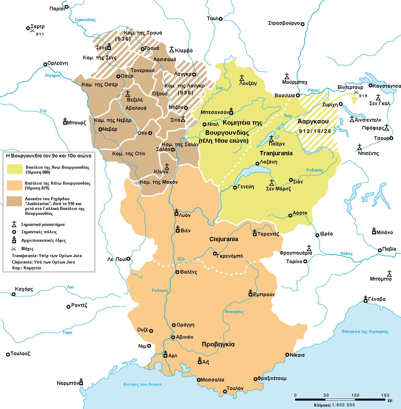 Κάτω και Άνω Βουργουνδία τον 9ο / 10ο αιώνα